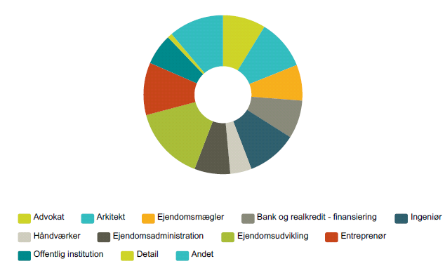 Medlemssammensætning af brancher i Byggesocietetet